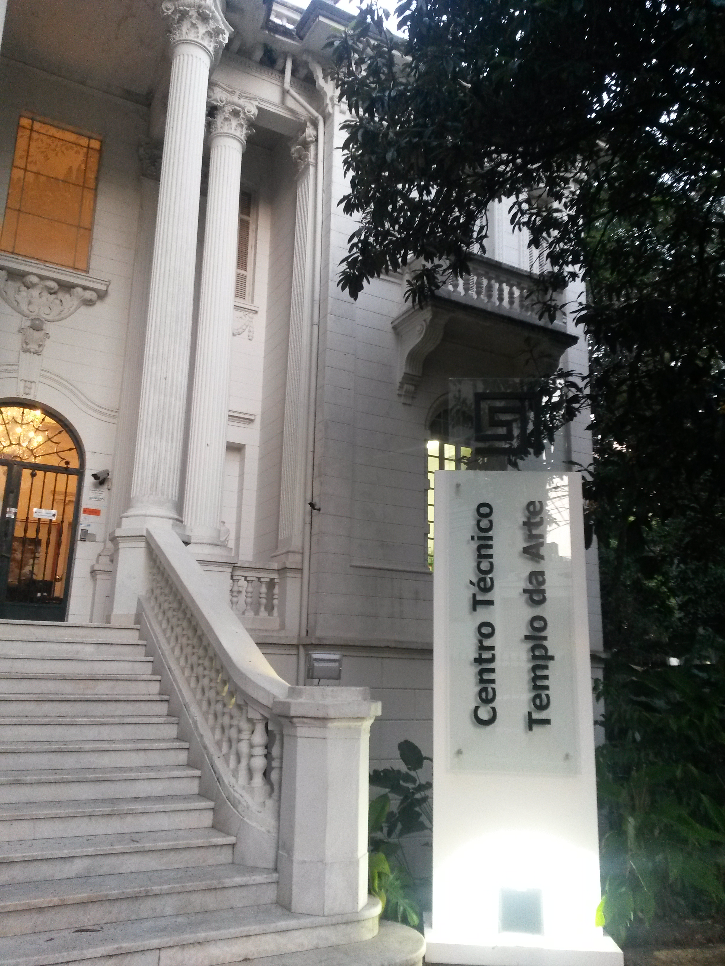 Placa que descreve a nova utilização da Residência da Família Jafet na Rua Costa Aguiar, 1013 em São Paulo (SP), Brasil